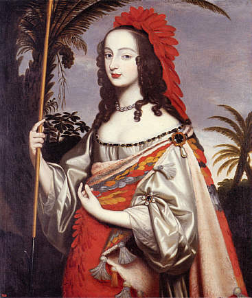 Das Porträt der Schwester Luise Hollandines gehört in die Reihe der Maskeraden und Verkleidungen, die die exotischen Neuerfahrungen der damaligen Zeit darstellten. Sophies Verkleidung einer südamerikanischen Indianerin dürfte auf die mitgebrachten Objekte und die Erzählungen ihres Onkels Graf Johann Moritz von Nassau-Siegen zurückgehen, der niederländischer Gouverneur von Brasilien war und 1644 nach Den Haag zurückkehrte. Öl auf Leinwand, Luise Hollandine von der Pfalz, nach 1644